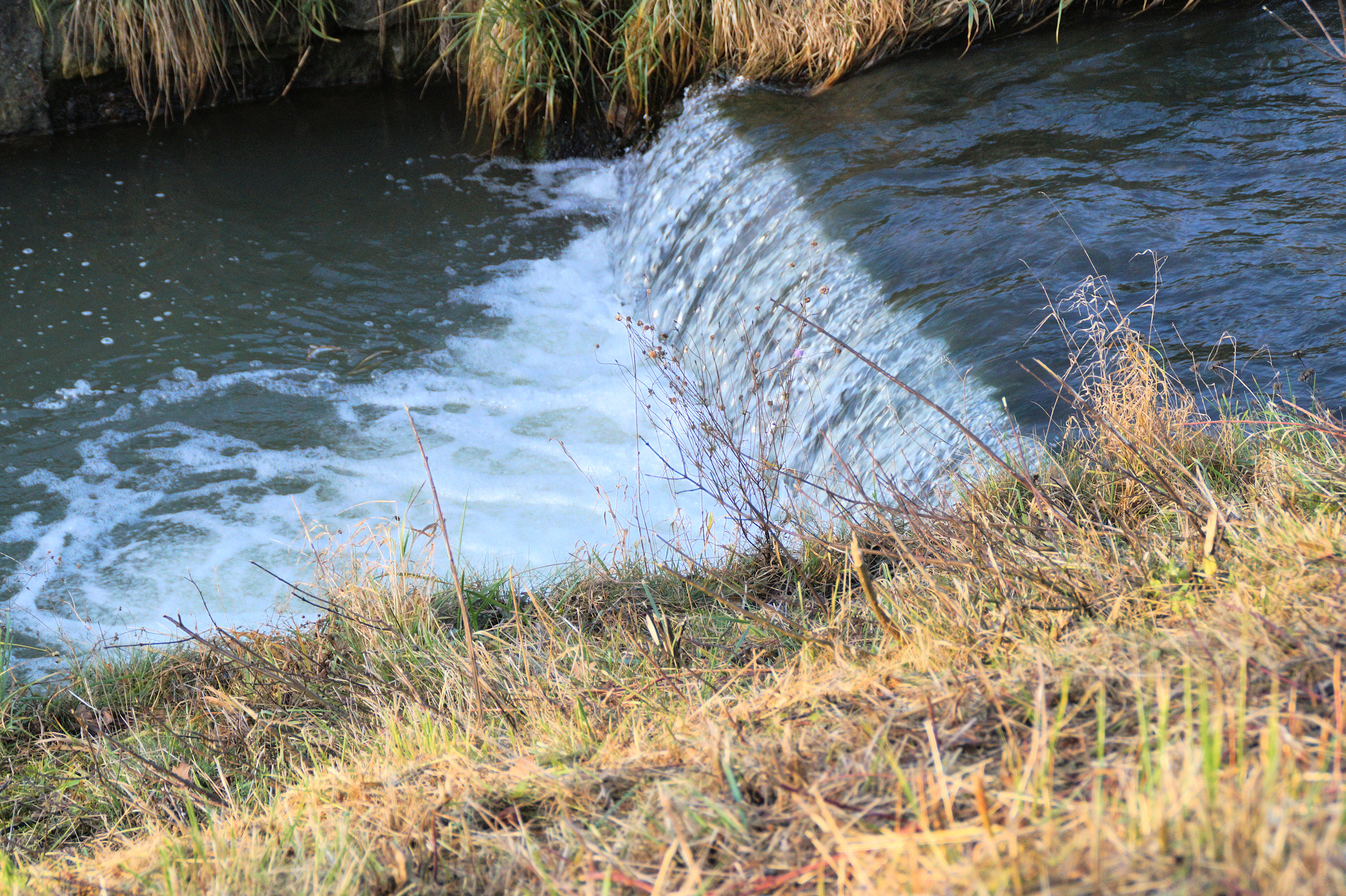 Schmida bei Zaußenberg, Kaskade - Dez.2015